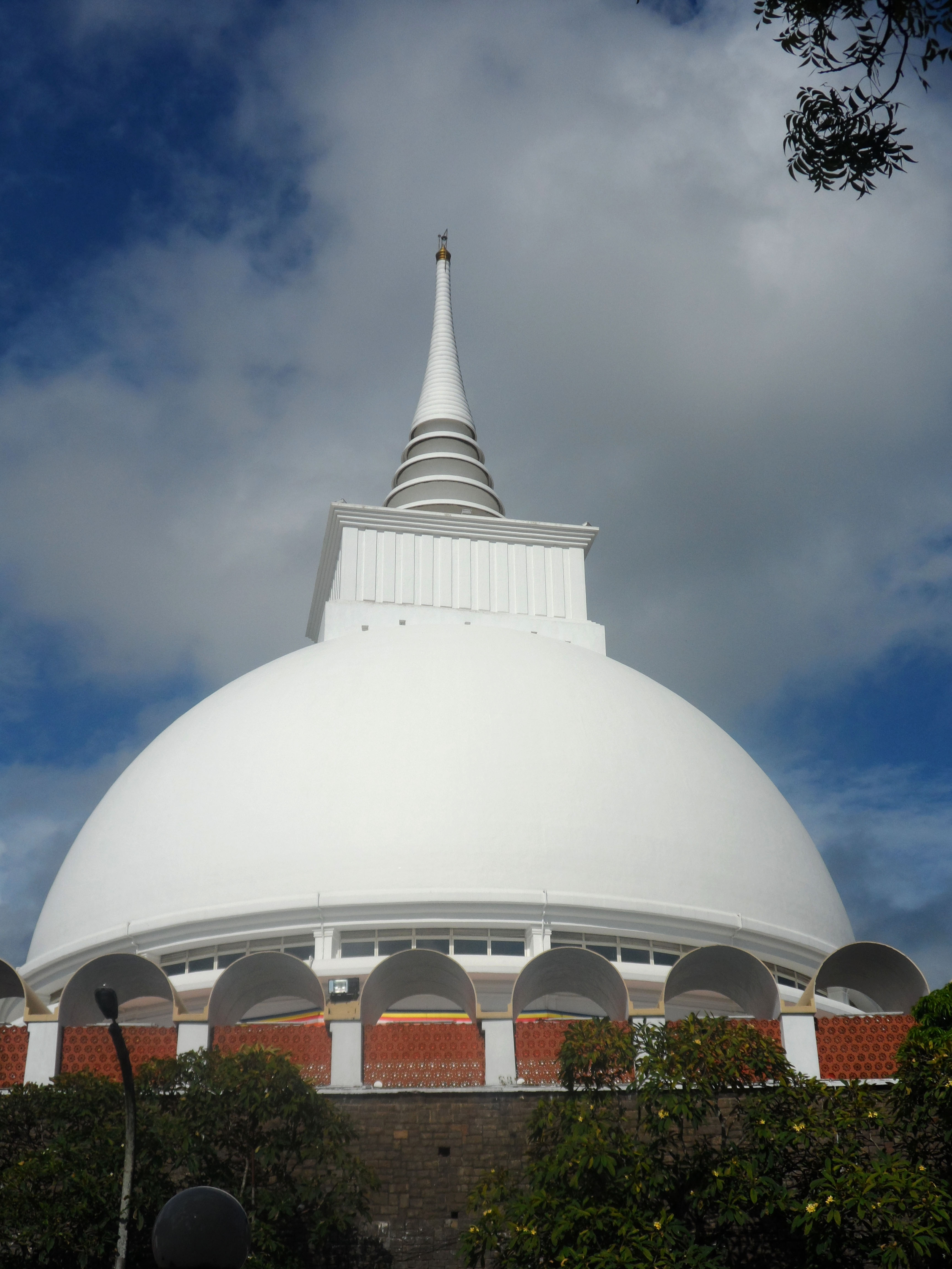 Kalutara Temple